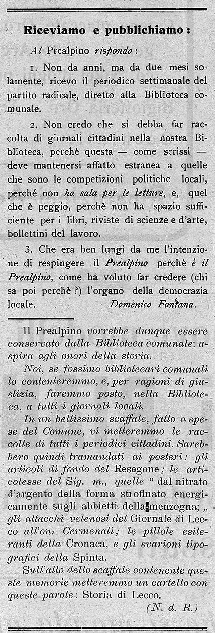 La Spinta, 23 marzo 1910 - Lettera del Bibliotecario di Lecco